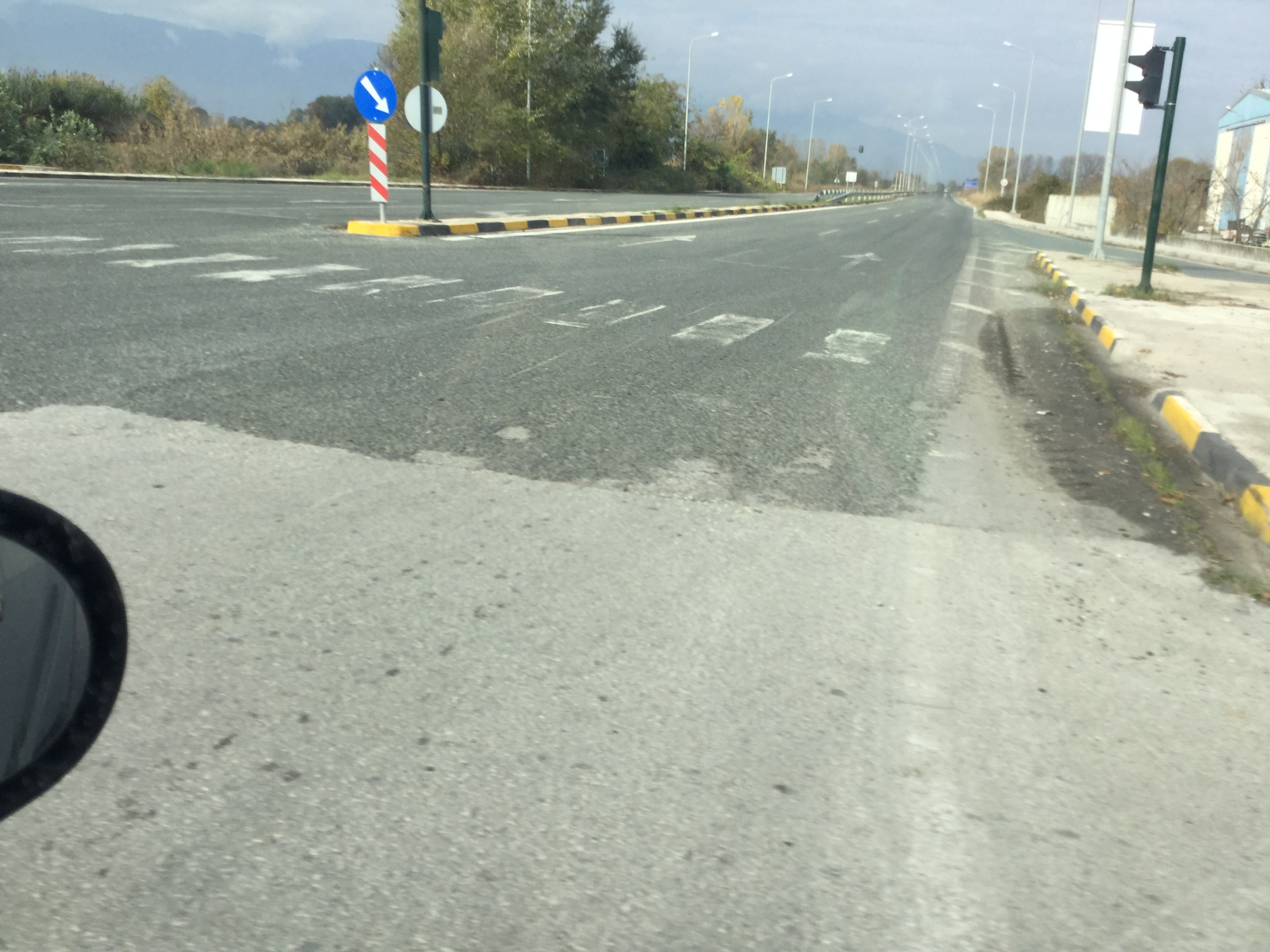 Άποψη του τμήματος κόμβος Πύλης-κόμβος Καλαμπάκας από τον κόμβο Πύλης